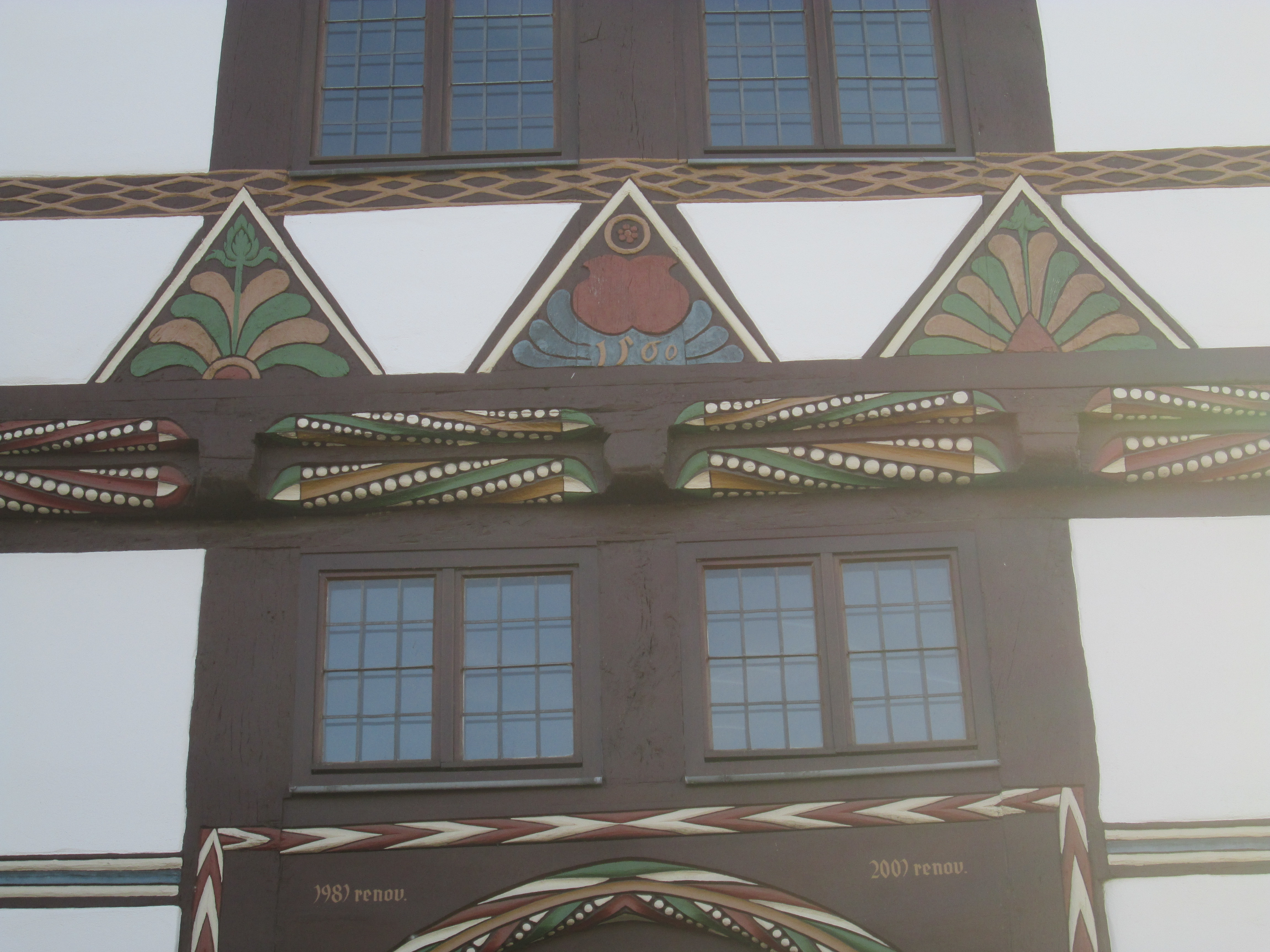 Haus Böttrich, Sternstr. 13 in Warburg